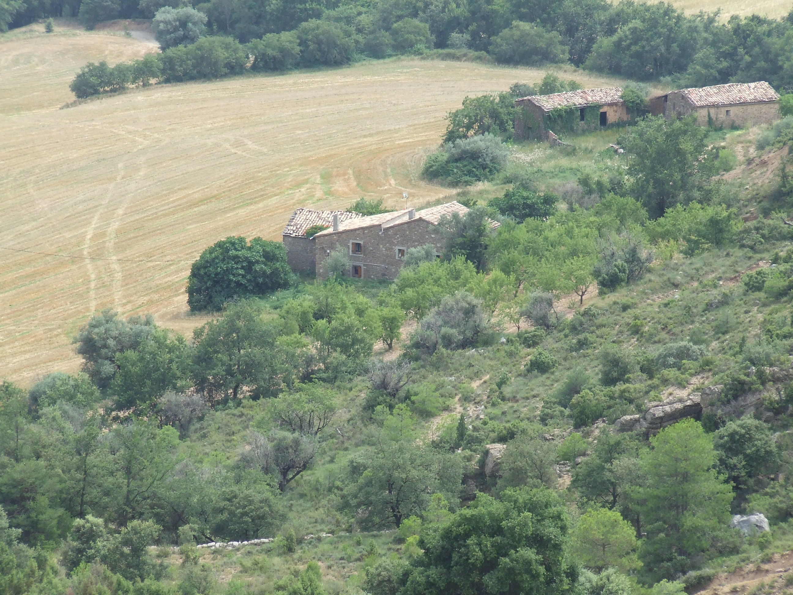 Cal Jou i Casa Montsó (Abella de la Conca, Pallars Jussà)